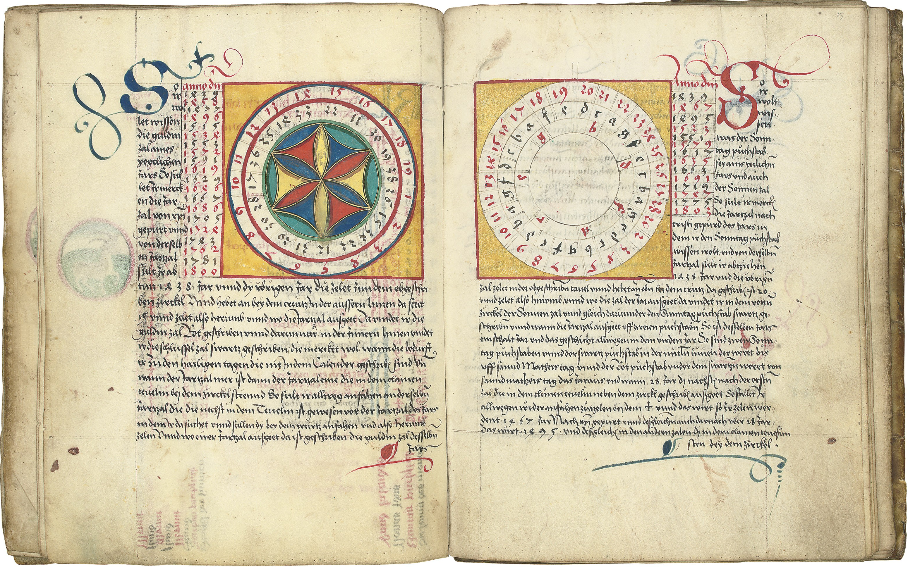 Johannes von Gmunden: Calendar, [Nuremberg], 1496